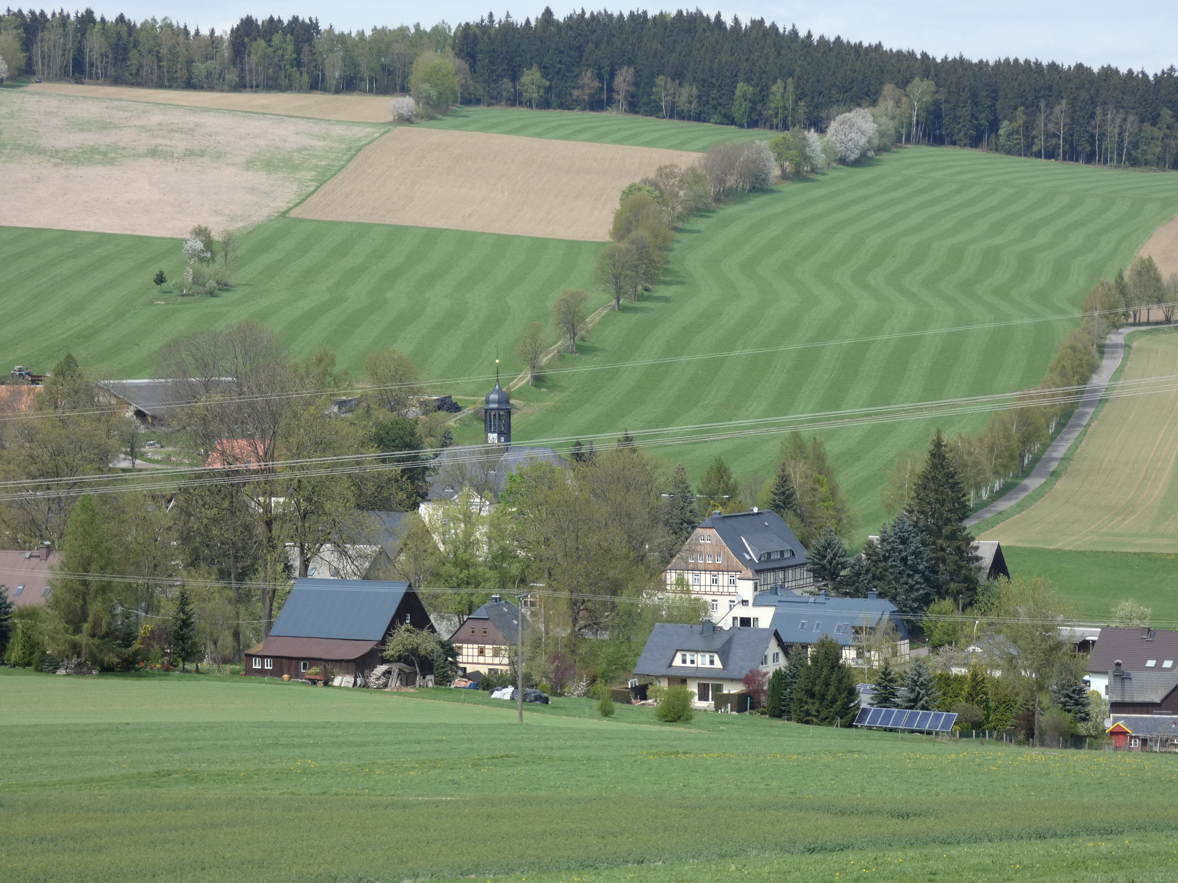 Ortsmitte